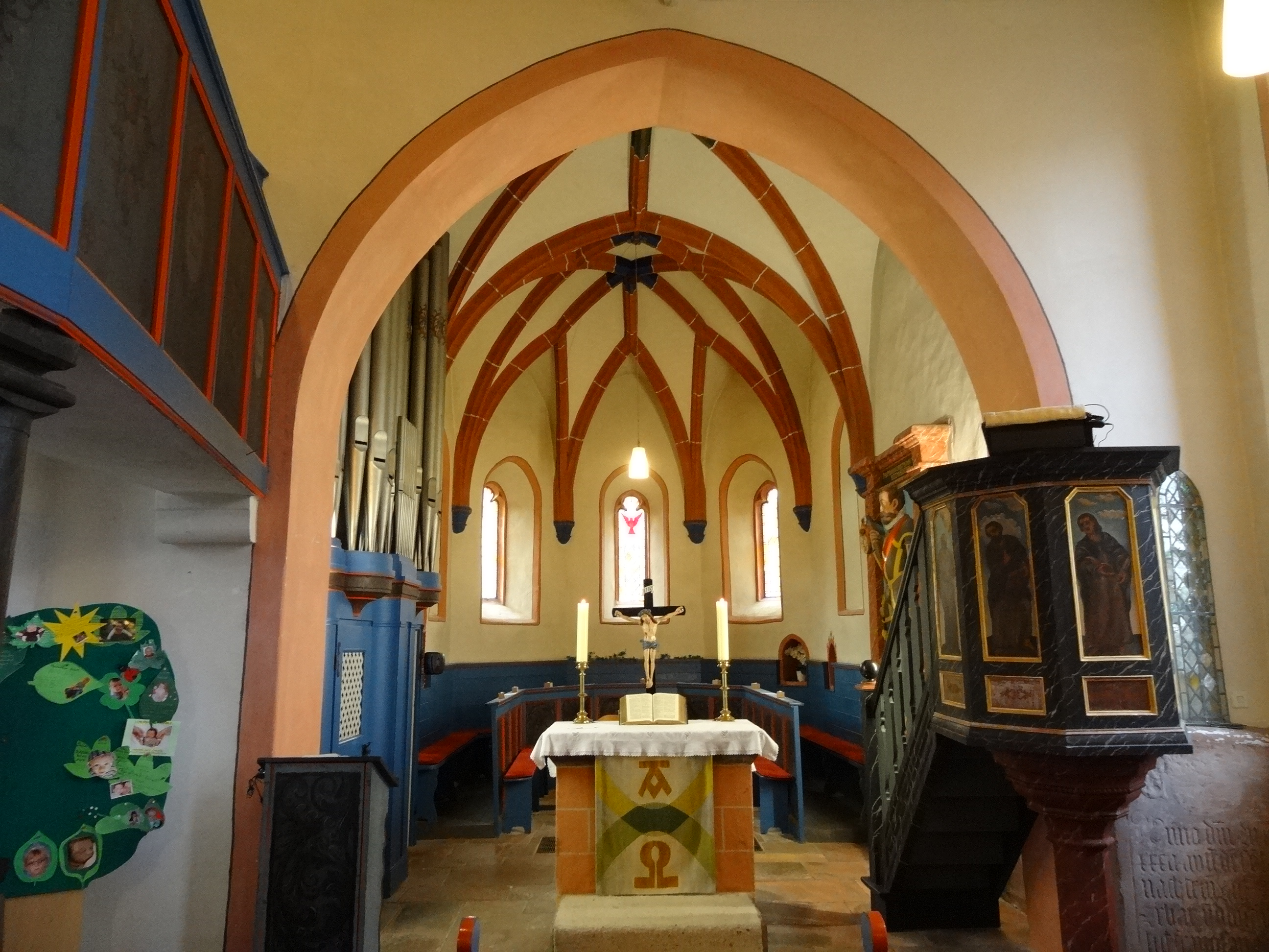 Evangelische Pfarrkirche (Schwickartshausen)